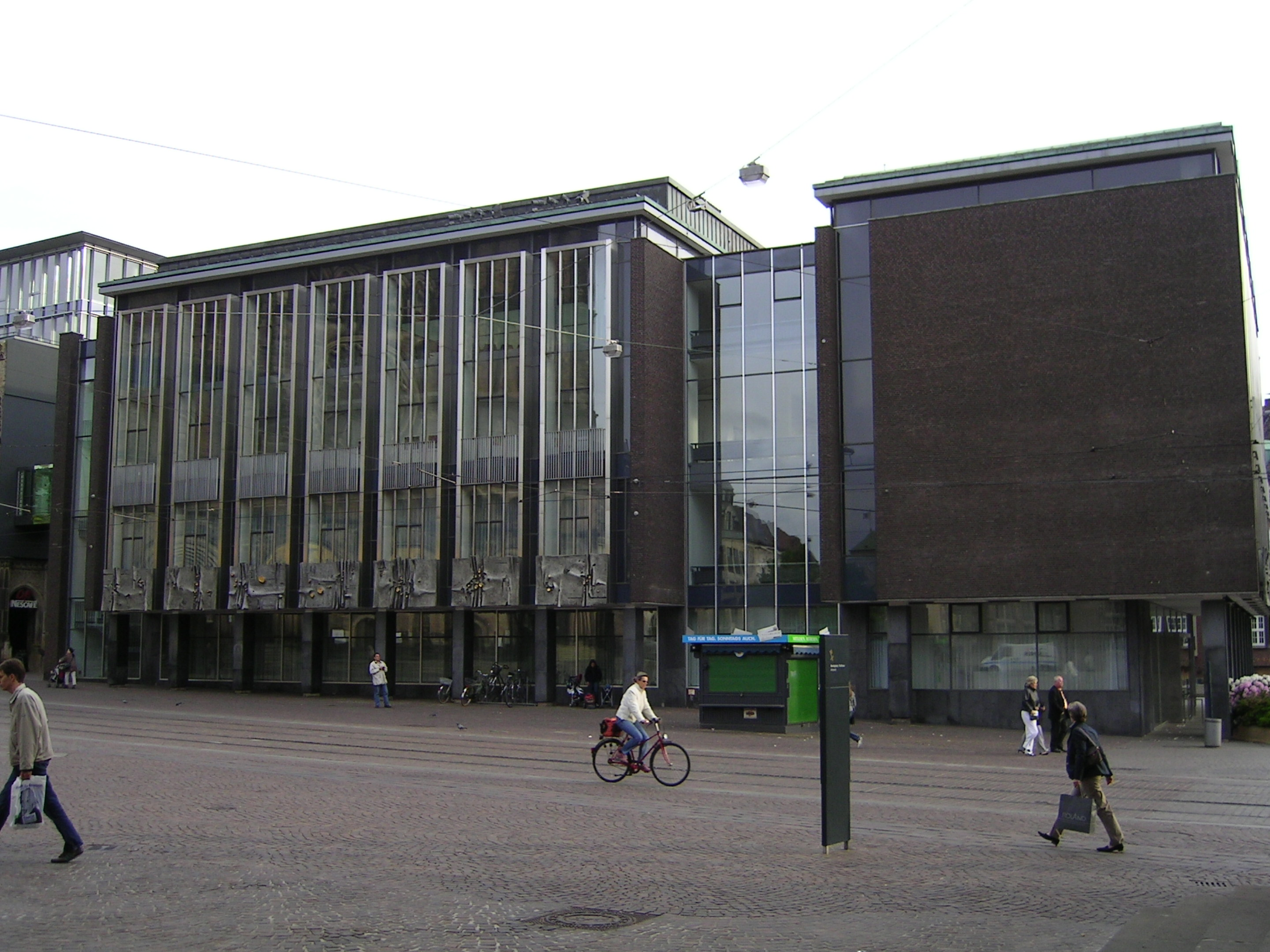 Bremische Bürgerschaft, Bremen User:Tarawneh/rami